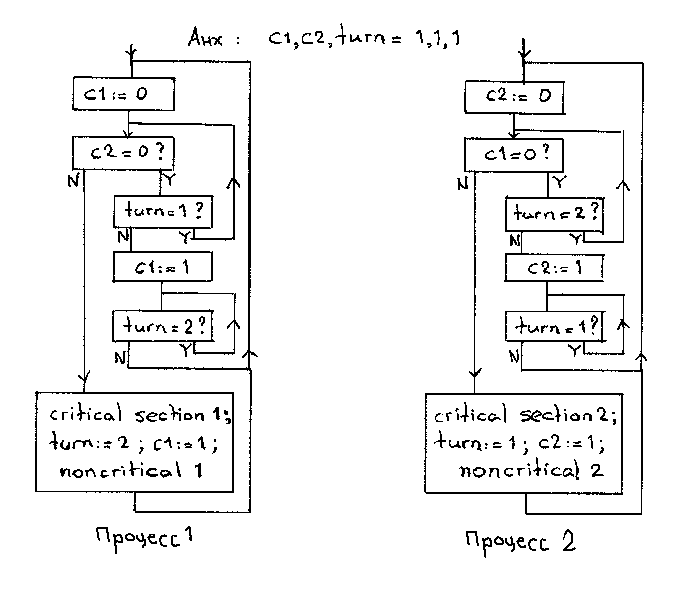 Монгол: Деккерийн алгоритм